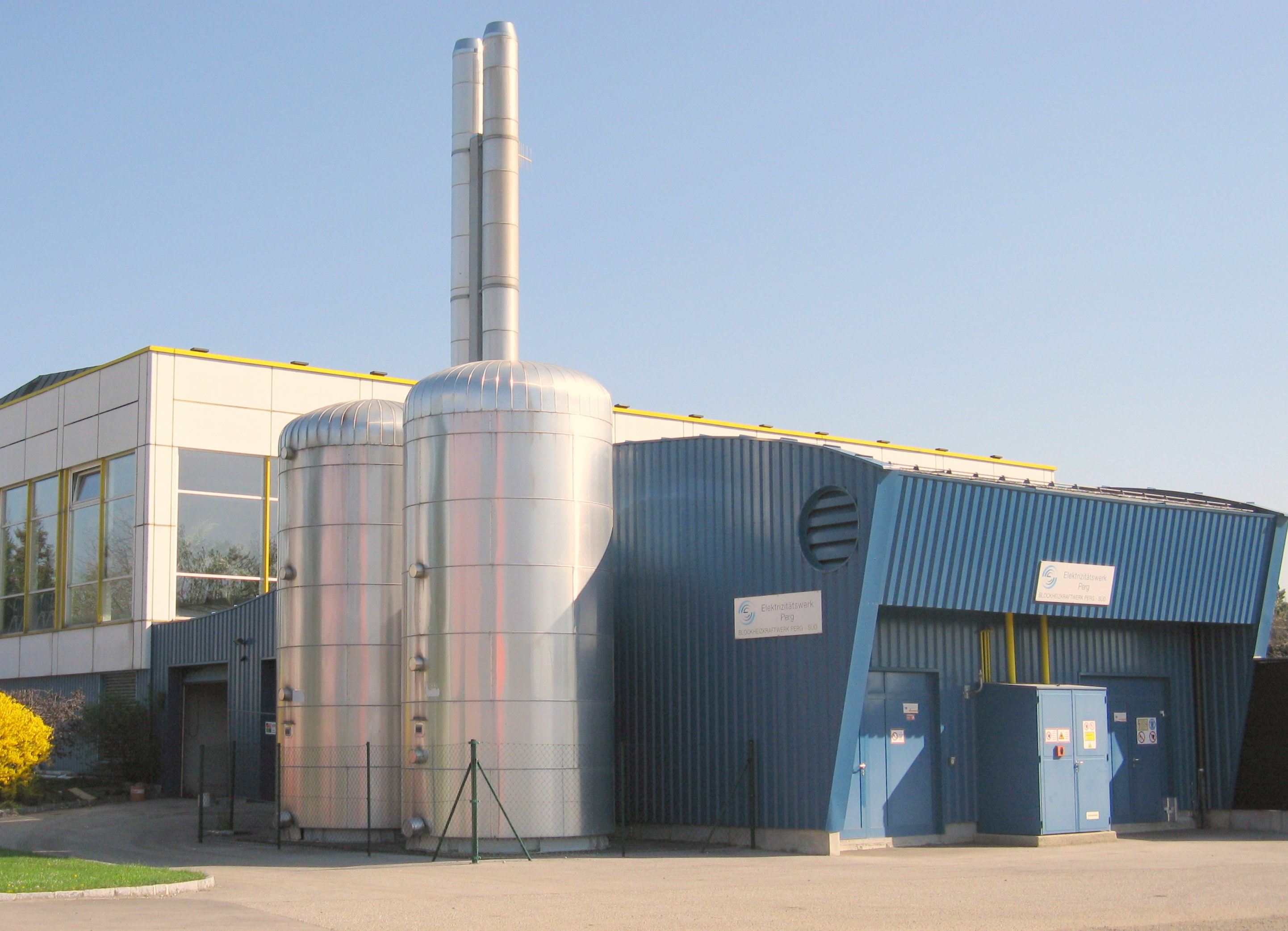 Blockheizkraftwerk des Elektrizitätswerkes Perg